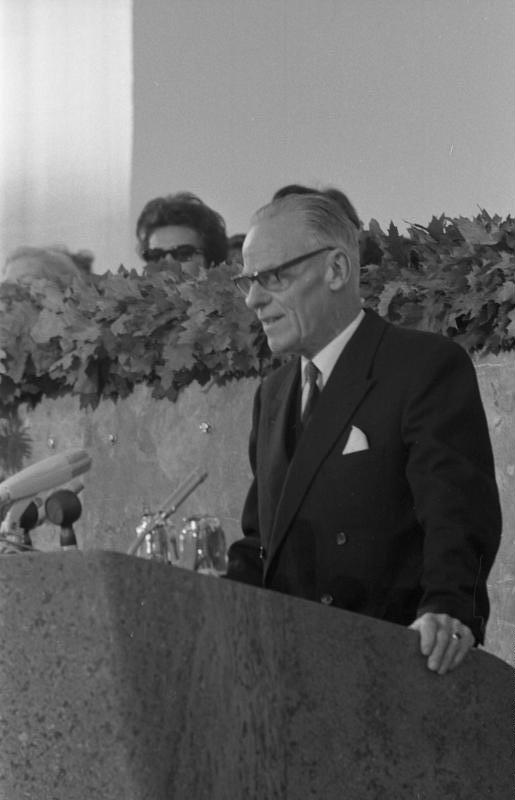 Verleihung des Friedenspreises des deutschen Buchhandels an Kardinal Bea u. [Willem A.] Visser't Hooft in der Paulskirche